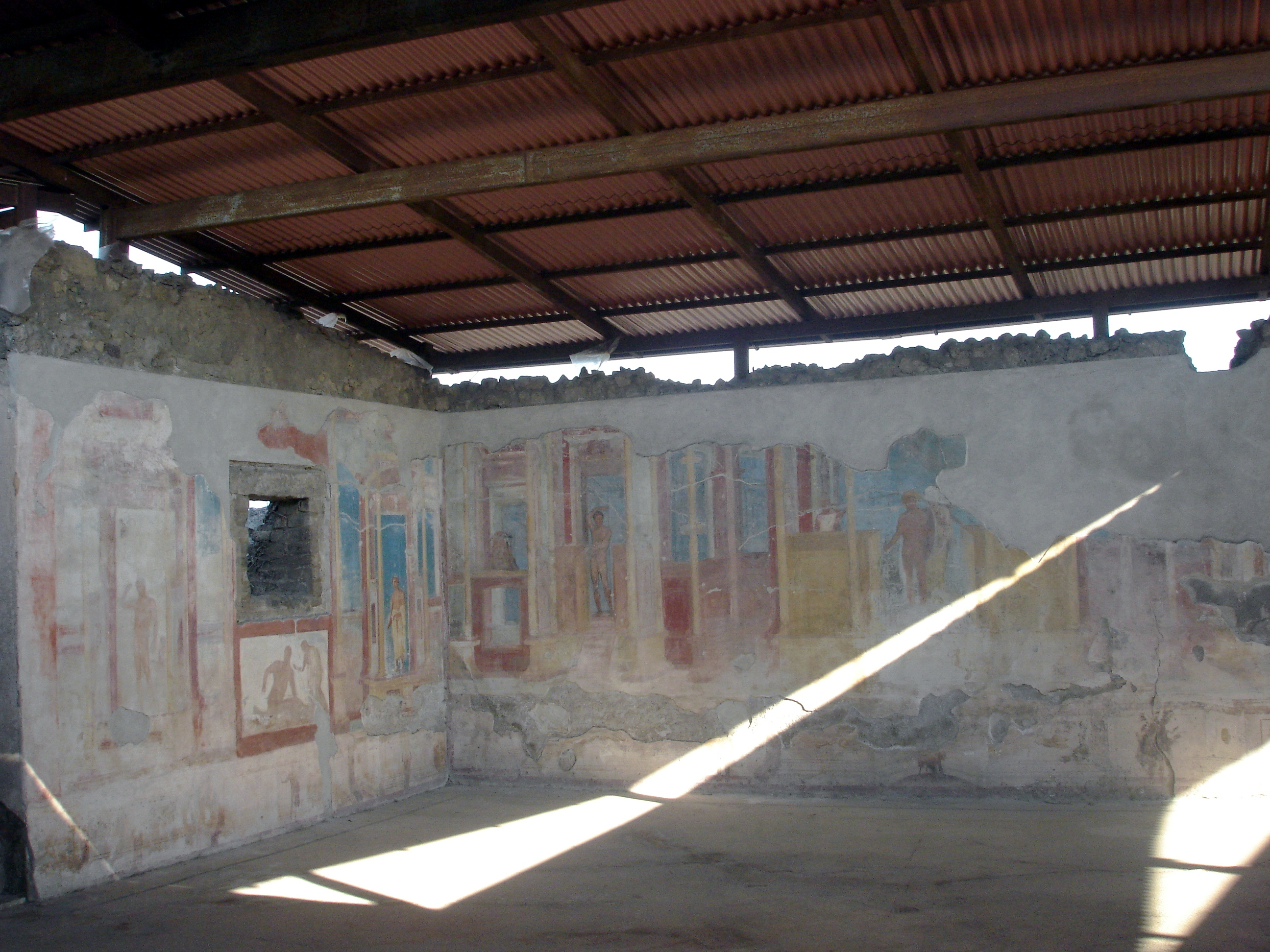 Fresque d'une maison à Pompéi